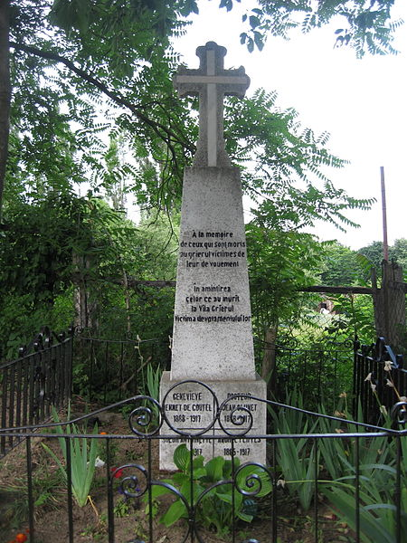 Monumentul realizat de Salvador Scutari (1880-1932) în amintirea membrilor Misiunii Medicale Franceze morți de tifos exantematic în 1917: dr. Jean Clunet (28 ianuarie 1878 - 3 aprilie 1917), infirmierele Andrée Flippes (1885 - 26 martie 1917) și Geneviève Hennet de Coutel (11 martie 1885 - 4 martie 1917) de la Société Française de Secours aux Blessés Militaires și călugărița Soeur Antoinette (1848-1917).